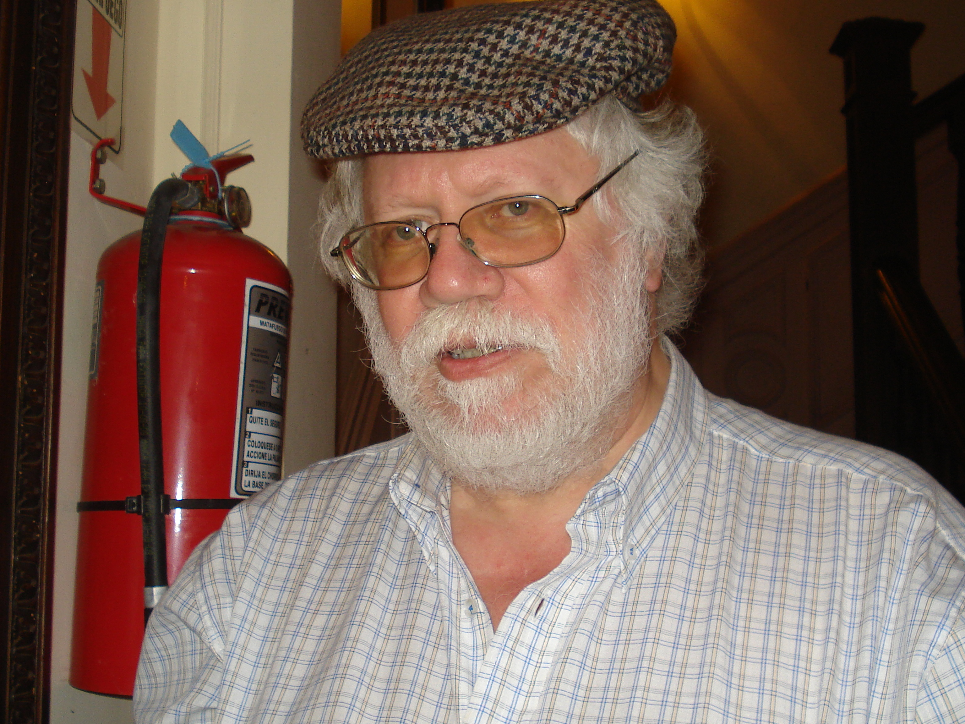 Juan Mauricio Renold